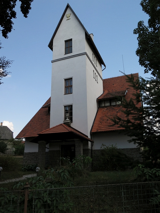 Českobratrský sbor, Husova 201, Merklín (okres Plzeň-jih).